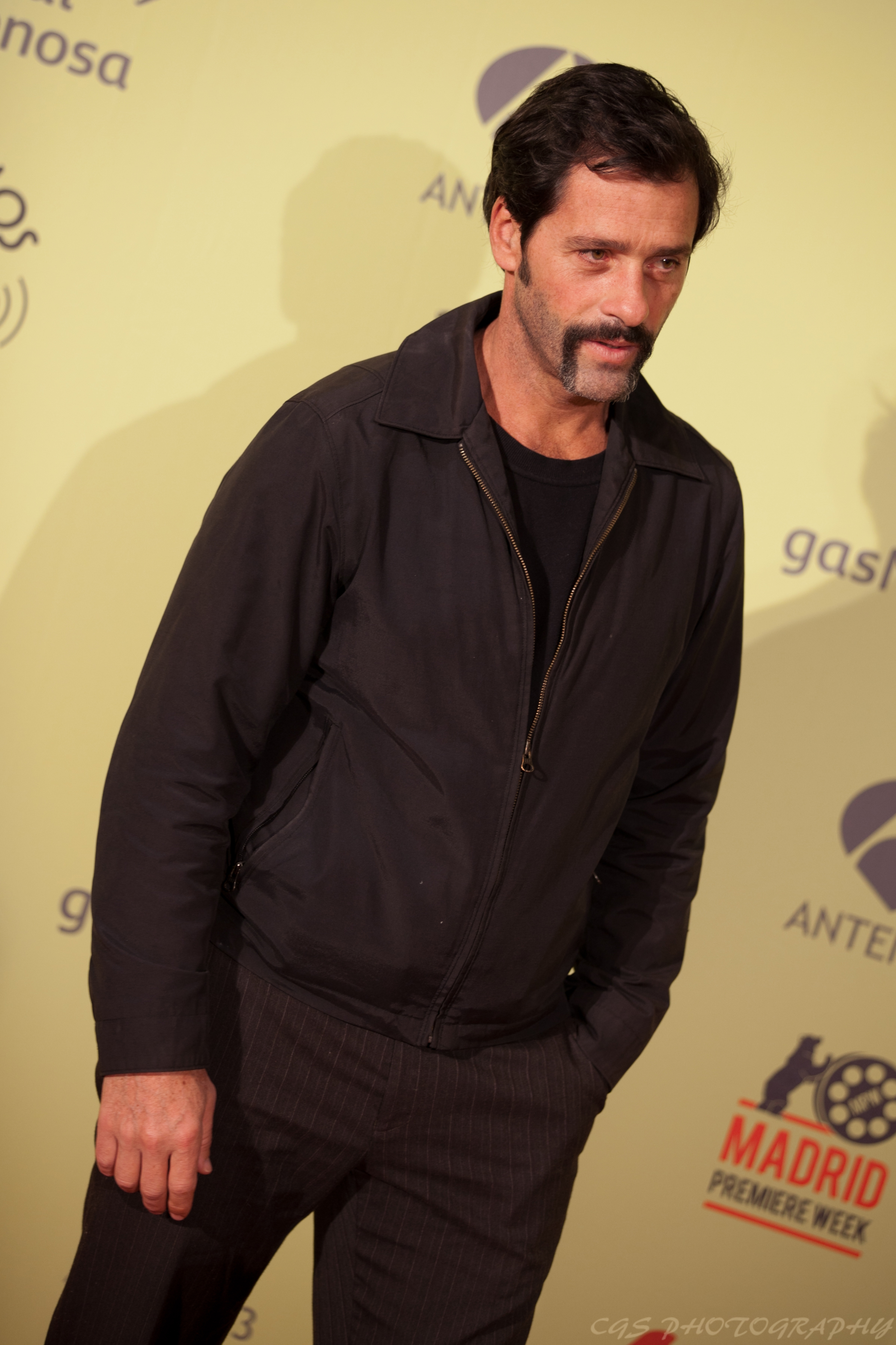 Juan Pablo Shuk (El Barco)